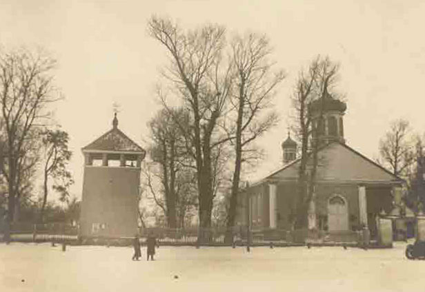 Беларуская (тарашкевіца): Антопаль (Antopal), пляц Рынак (plac Rynak). Царква